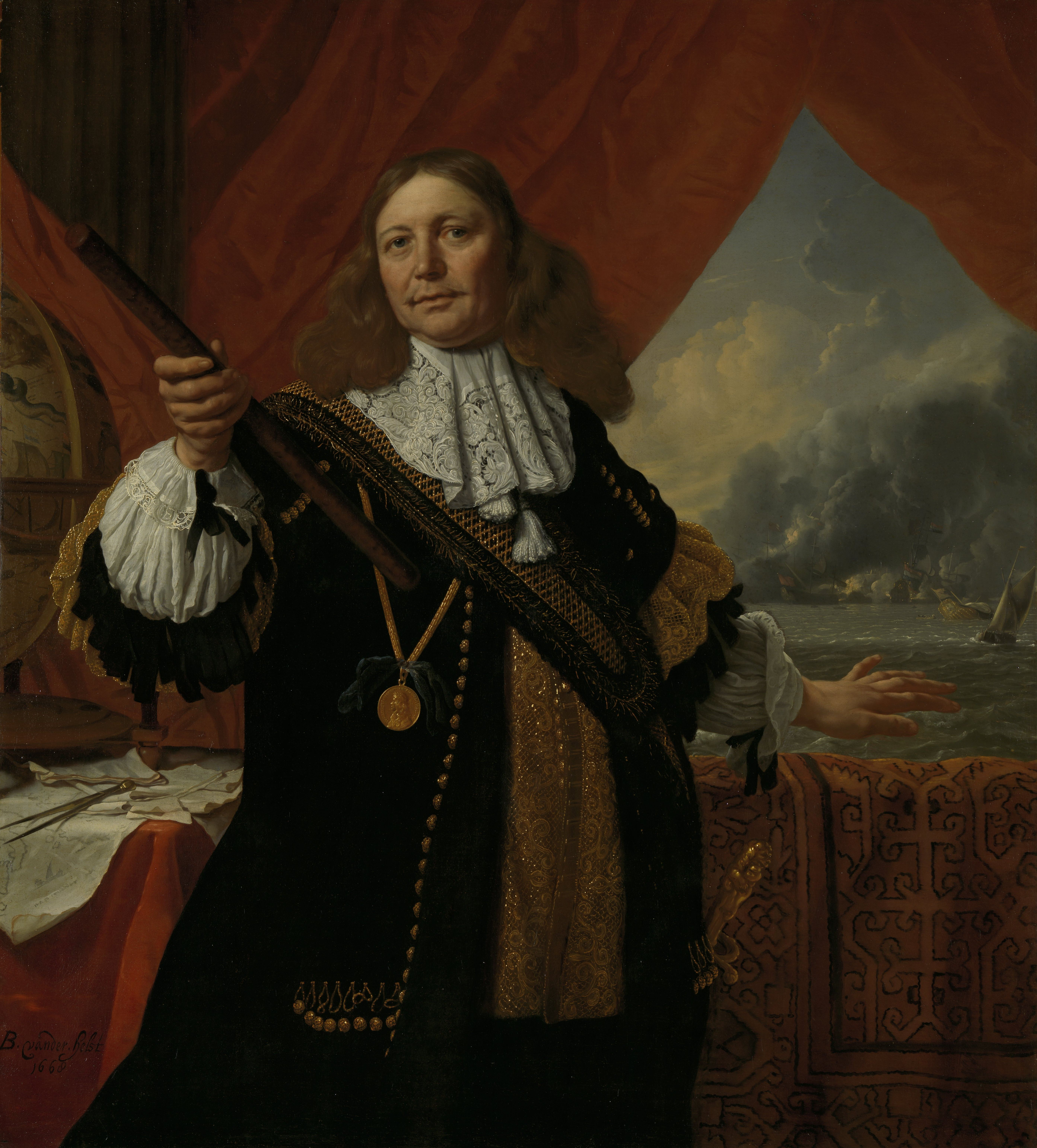 Portret van Johan de Liefde, vice-admiraal. Kniestuk, staand met een commandostaf in de rechterhand. Links een tafel met zeekaarten, een passer en een globe. Om de hals een ketting met een portretmedaillon. Rechts in de verte een zeeslag.